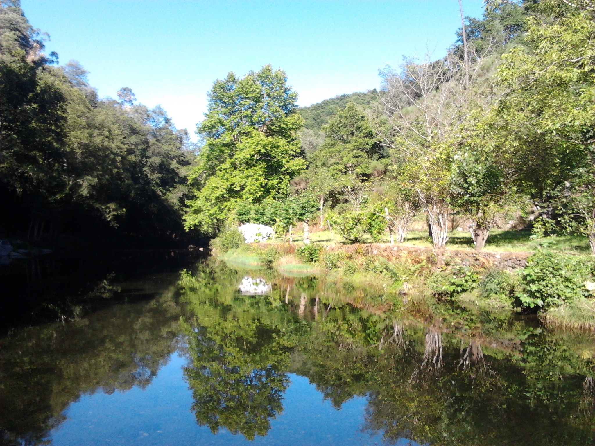 Amarante Olo Rio Olo